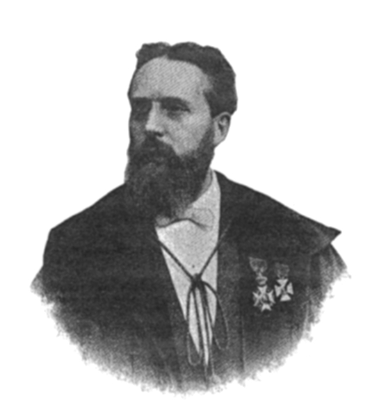 De Jean-Pierre Nuel.